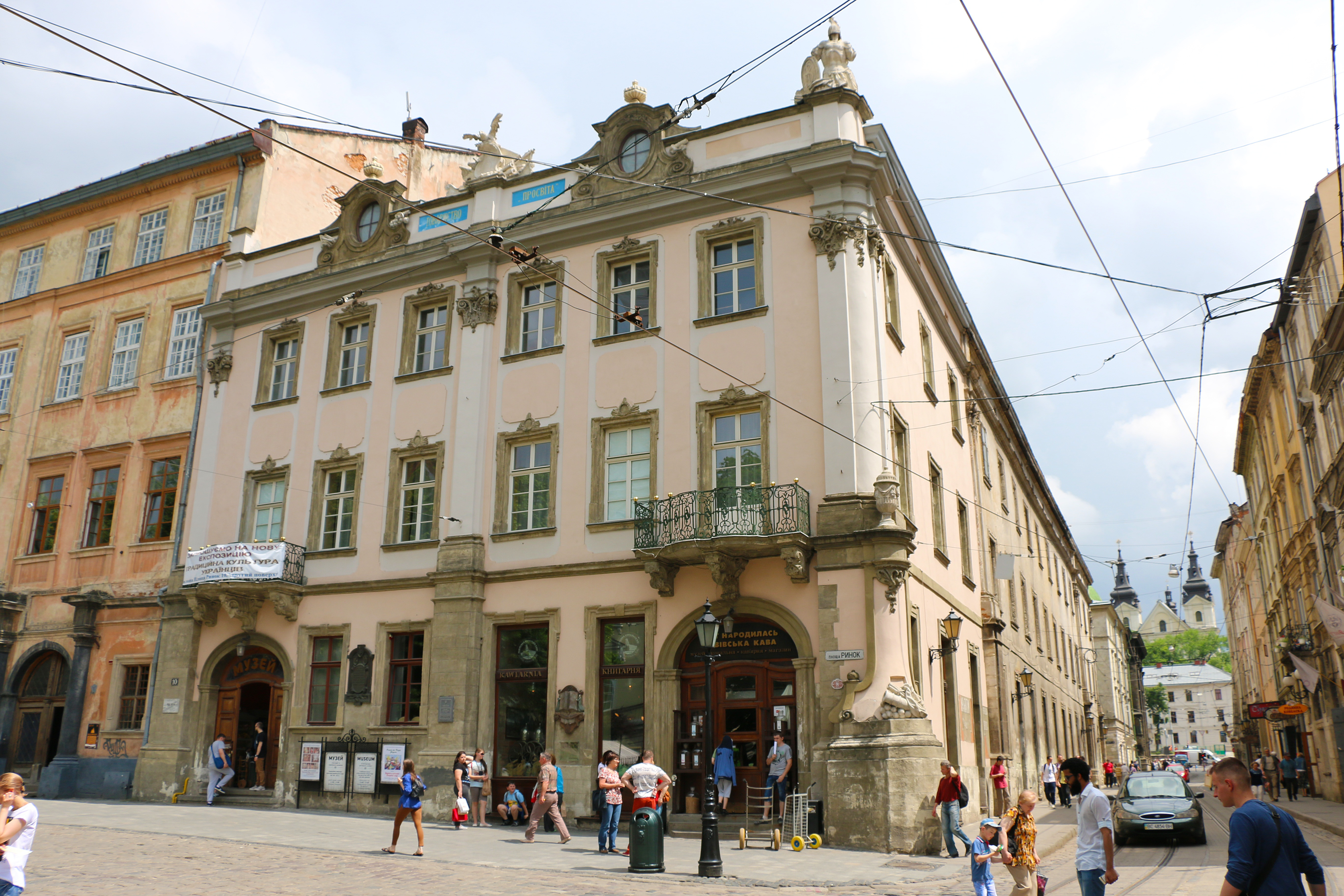 музей меблів — Будинок «Просвіти», в якому проголошено акт відновлення української держави, Львів, Ринок пл., 10